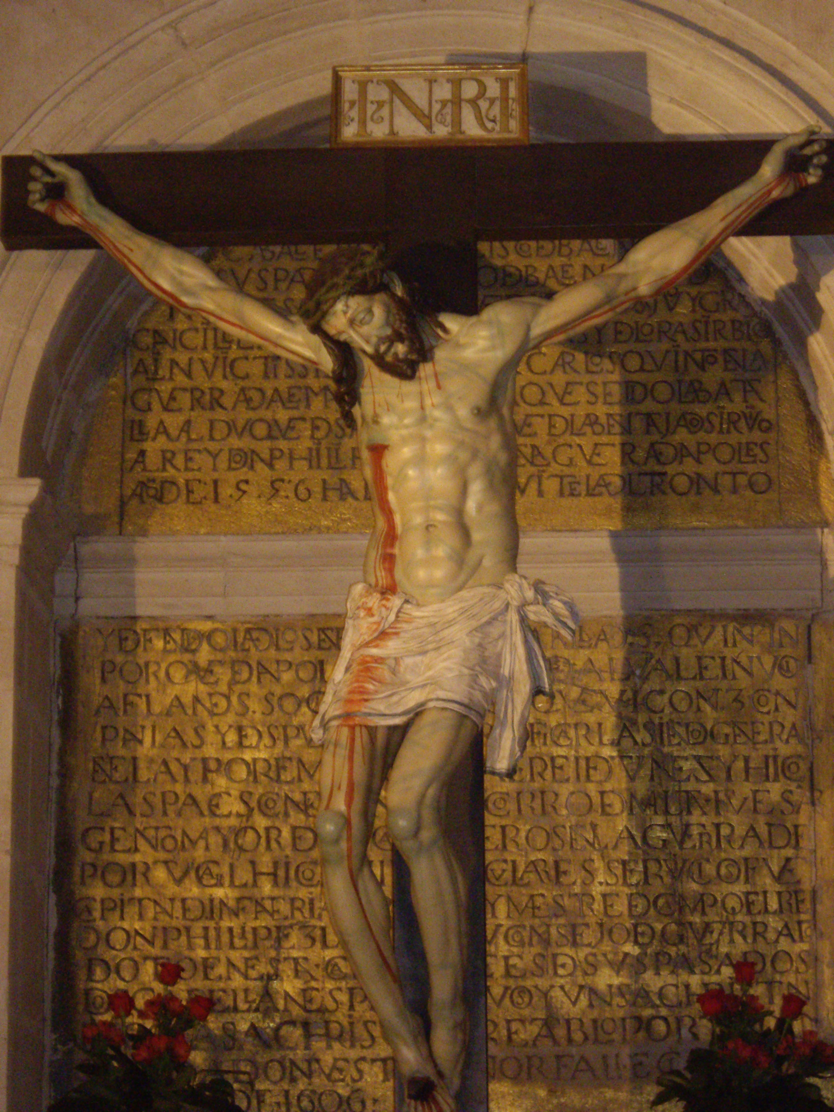 Santísimo Cristo de las Injurias. Anónimo del s. XVI. S. I. Catedral de Zamora, España